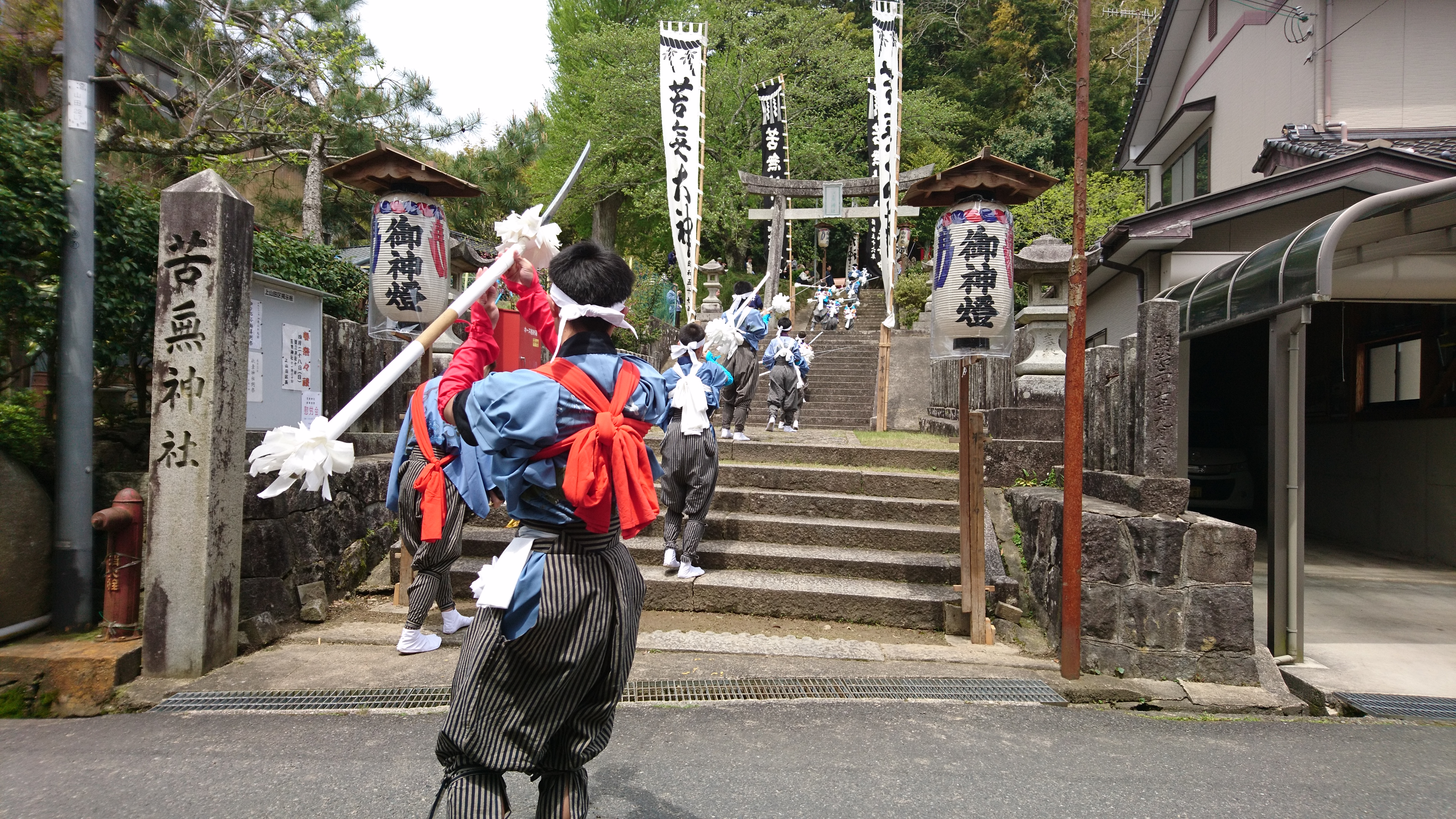 加悦谷祭 上山田地区の芸能